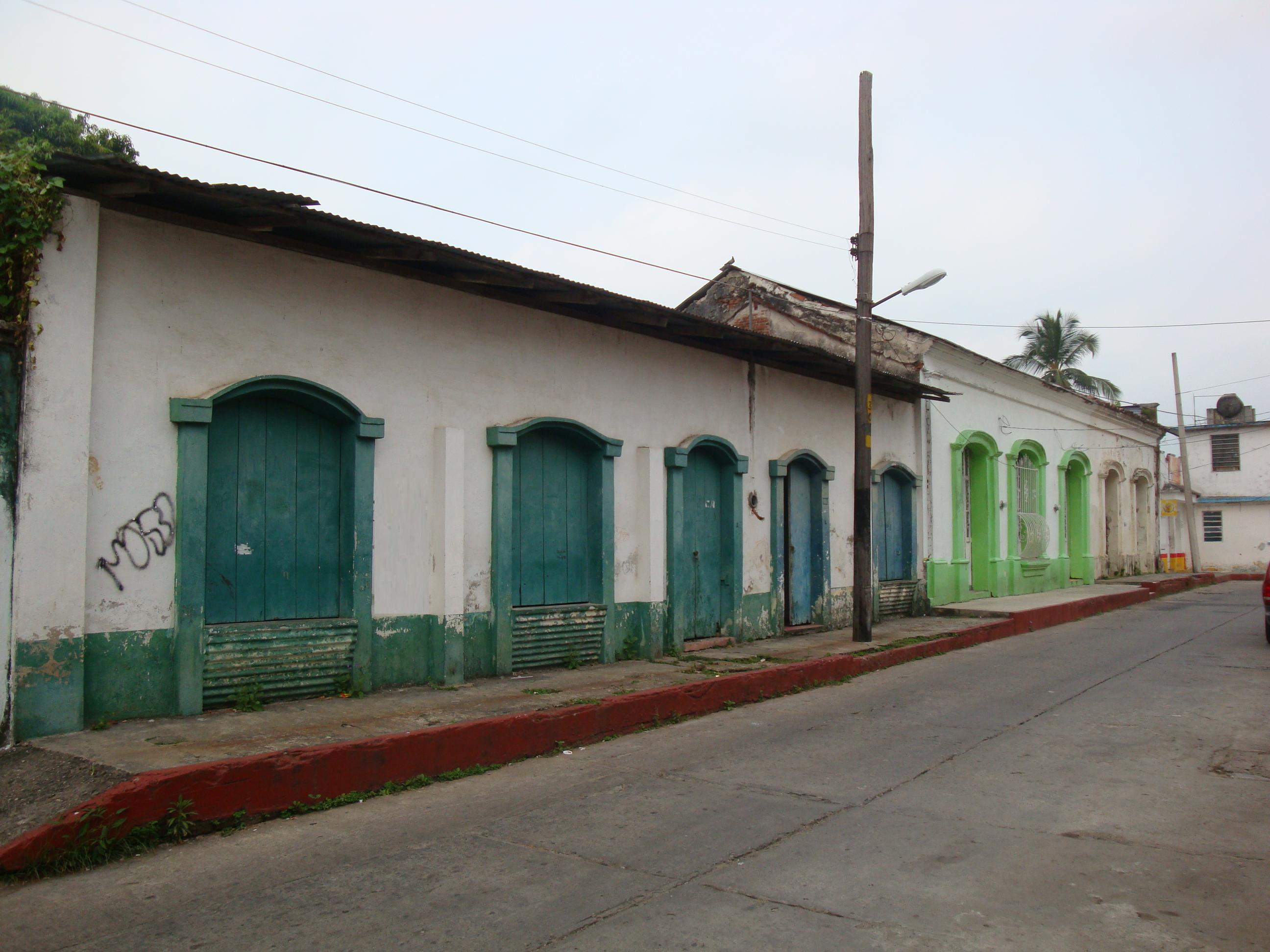 Casas antiguas en el centro de la ciudad de Tacotalpa en el estado de Tabasco Méxco.